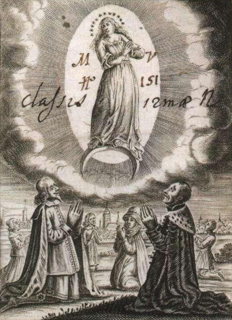 Беларуская (тарашкевіца): Кароль і вялікі князь Ян Казімер (Jan Kazimier) і Альбрэхт Станіслаў Радзівіл (Albrecht Stanisłaŭ Radzivił) у часе супольнай малітвы на правым беразе Віслы на фоне занятай швэдамі Варшавы, 1655